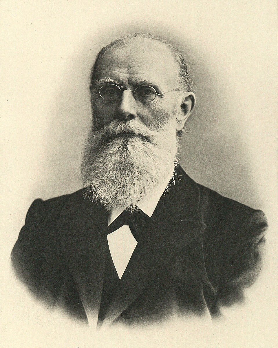 Depicted person: Franz Wüllner